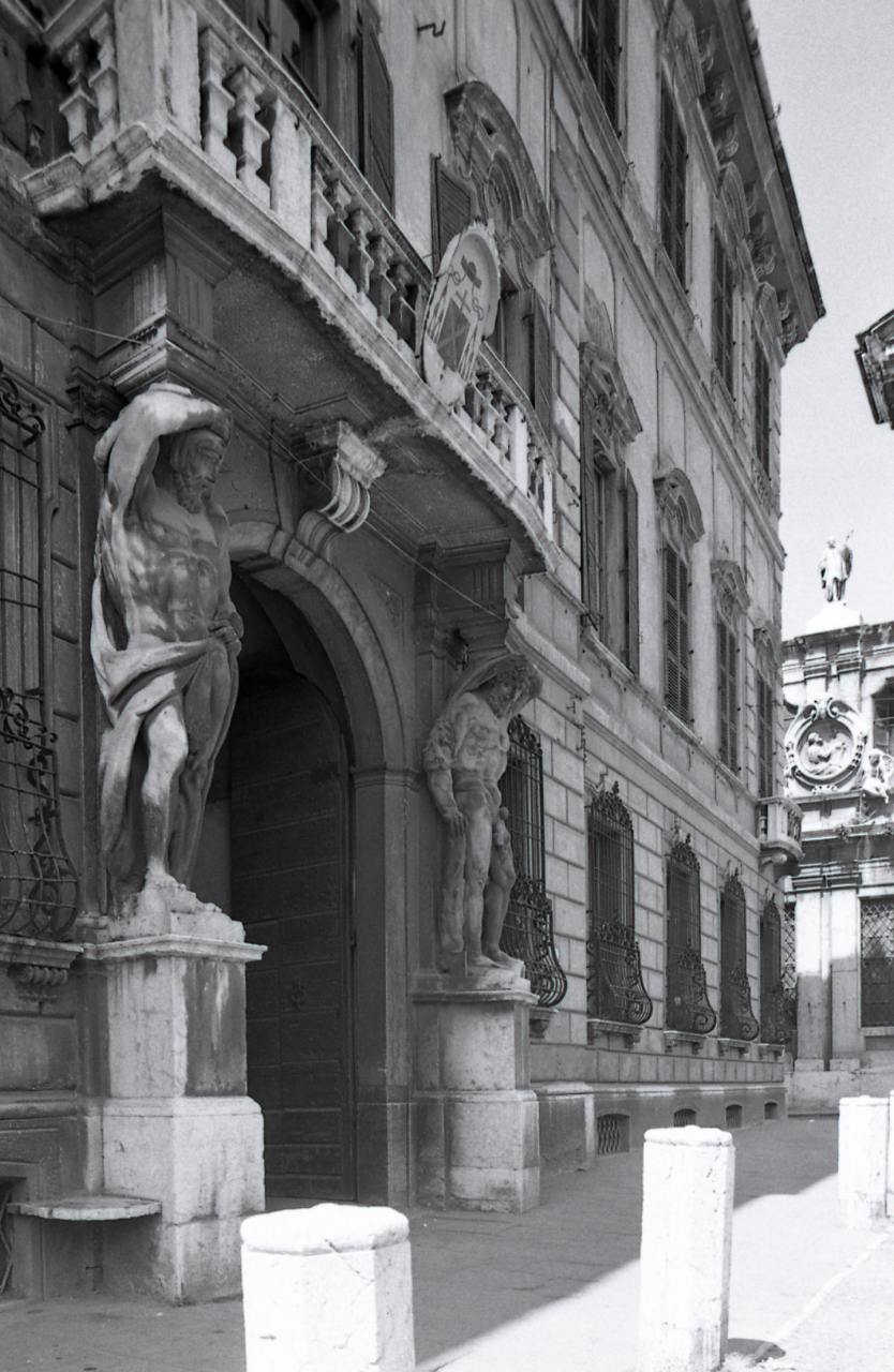 Servizio fotografico : Mantova, 1979 / Paolo Monti. - Strisce: 2, Fotogrammi complessivi: 11 : Negativo b/n, gelatina bromuro d'argento/ pellicola ; 35 mm. - ((Sul portanegativi: N[I]K[MA]T FP4. - All'interno del portanegativi: la serie è anche identificata da una linea orizzontale a pennarello nero che separa la suddetta serie dalla precedente di soggetto diverso. - Occasione: Mostra a Parma e catalogo. - Fonte: Agenda di Paolo Monti: Nikon Leika 3001-/ Monti 1978 (1978-1982), presso Archivio Paolo Monti. - Fonte: Monografia: Palazzi di Piacenza dal Barocco al Neoclassico, Torino, Istituto Bancario San Paolo (1979). - Fonte: Fattura di Paolo Monti: IV. Commesse/ Fattura n. 29/ Fotografie per mostra Società e cultura nella Piacenza del '700 (1979/10/05), presso Archivio Paolo Monti. - Fonte: Fattura di Paolo Monti: IV. Commesse/ Fattura n. 36/ Fotografie eseguite a Mantova - Palazzi del '700, per mostra Parma e catalogo (1979/10/16), presso Archivio Paolo Monti